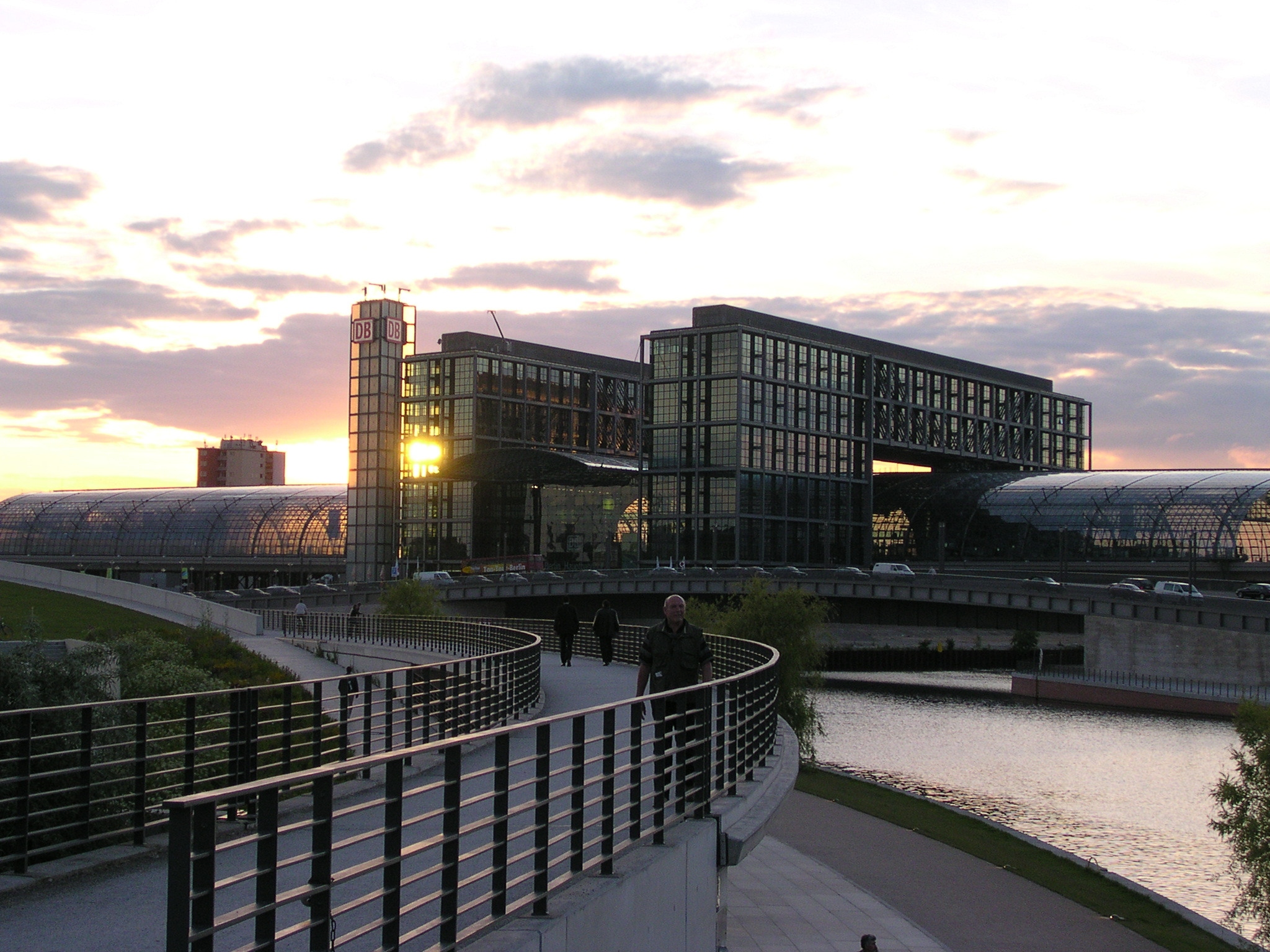 Sonnenuntergang hinter dem Berliner Hauptbahnhof, aufgenommen aus südöstlicher Richtung